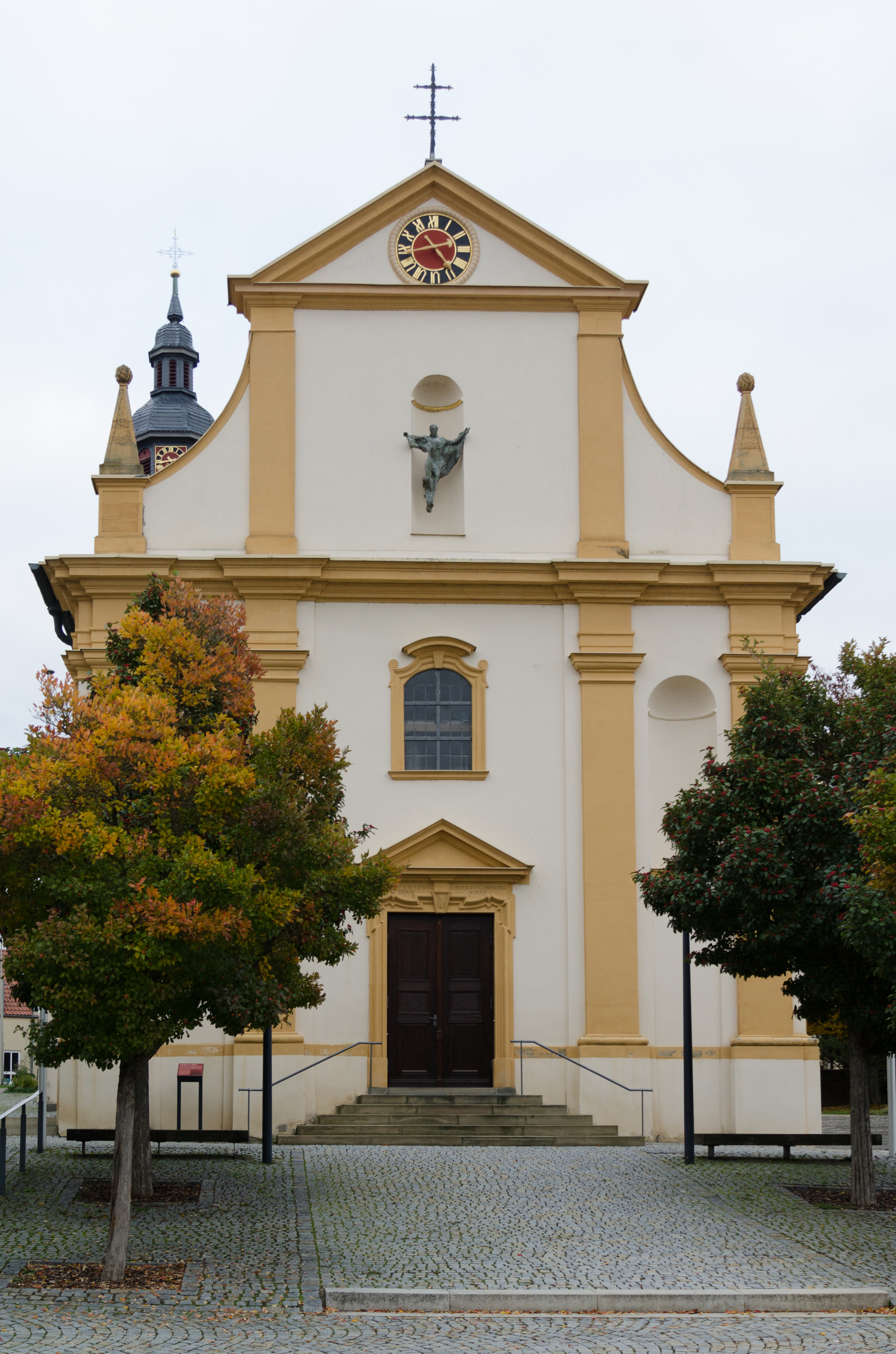 Kürnach, Kirchberg 6, Kath. Pfarrkirche St. Michael. In der Nische der Westfassade zeitgenössische Michaels-Skulptur von Karlheinz Oswald.